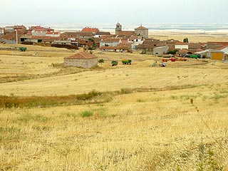 Peñalba de Ávila, vista desde el Norte. Autor de la foto: Eugenio Vega [colaborador de Wikipedia] agosto de 2005. Libre de derechos.